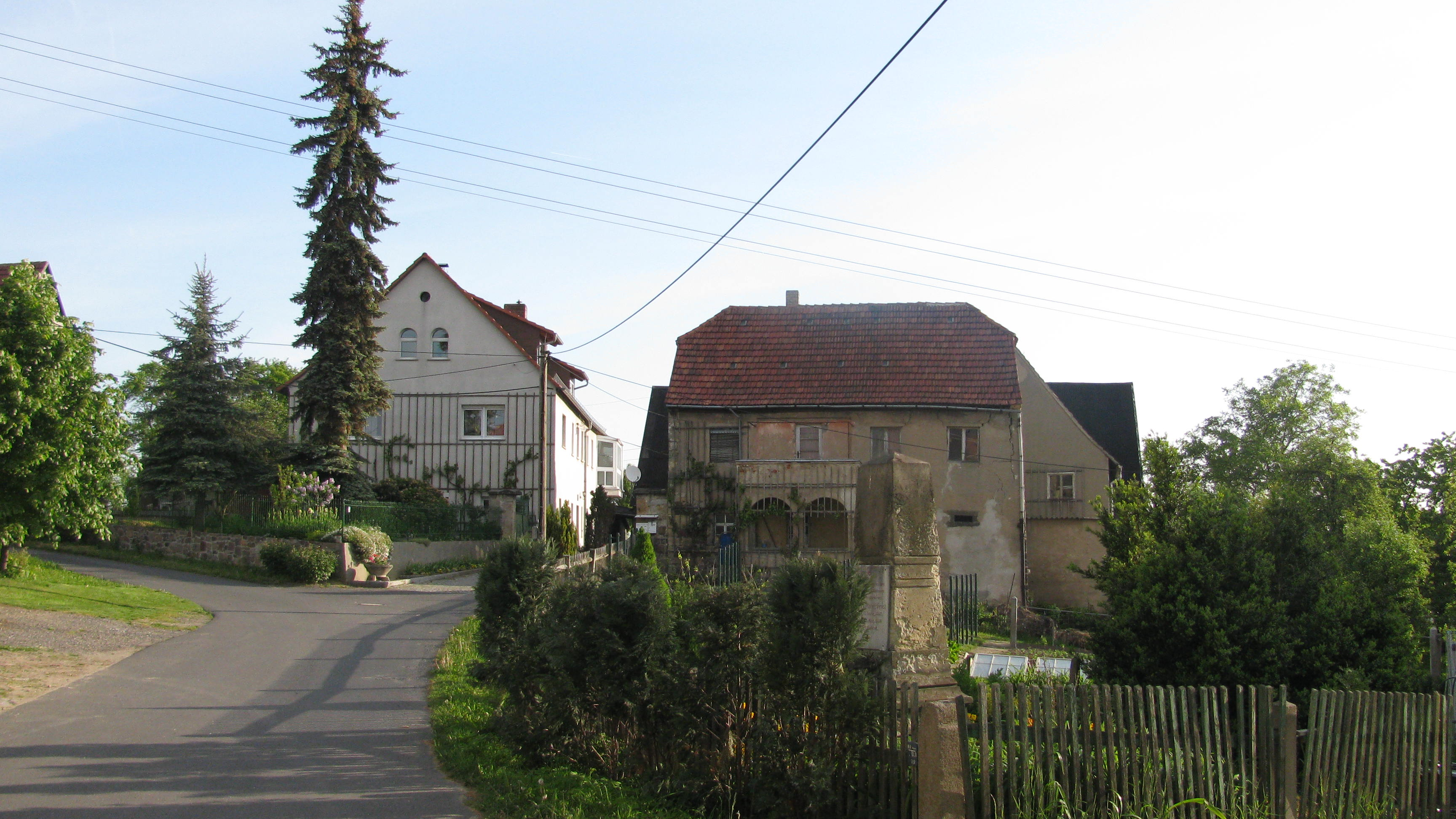 Stauseeweg 4 im Dorfkern von Rennersdorf, Ortsteil in der Ortschaft Mobschatz, Landeshauptstadt Dresden